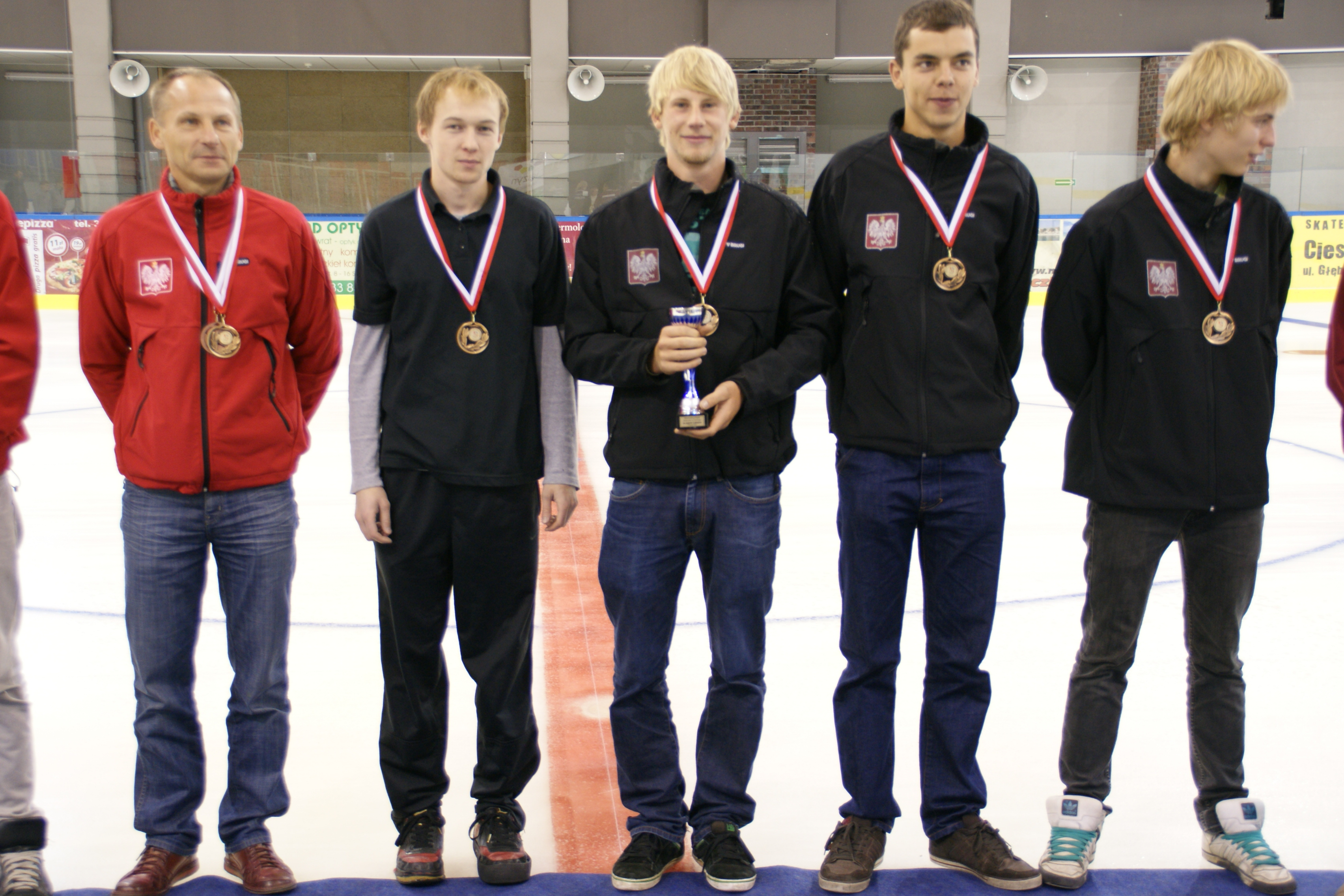 Od prawej: K. Stych, J. Chec, R. Sypieñ (s), K. Gawron, A. Sypieñ (t).